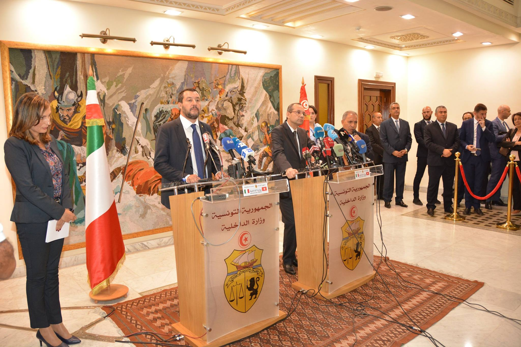 Conférence de presse entre les ministres de l'intérieur italien Matteo Salvini et tunisien Hichem Fourati, Tunis le 27 septembre 2018